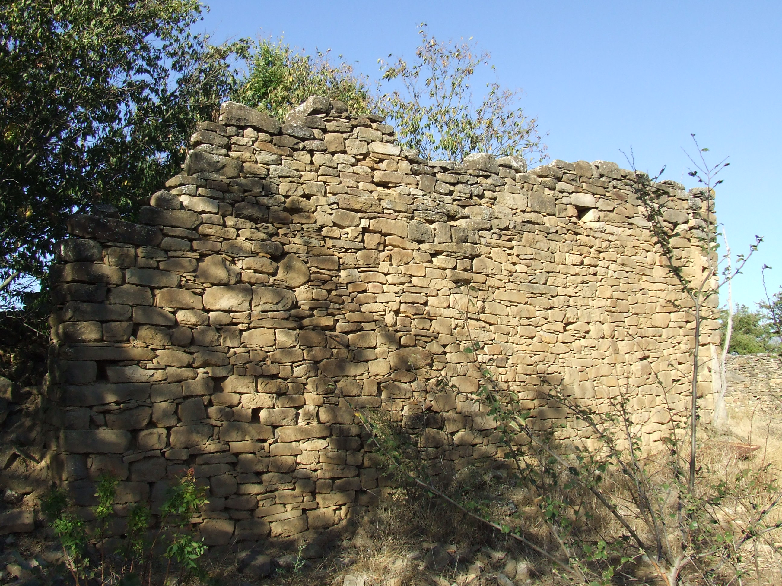 La Masia de Claveral (Mur, Castell de Mur, Pallars Jussà)